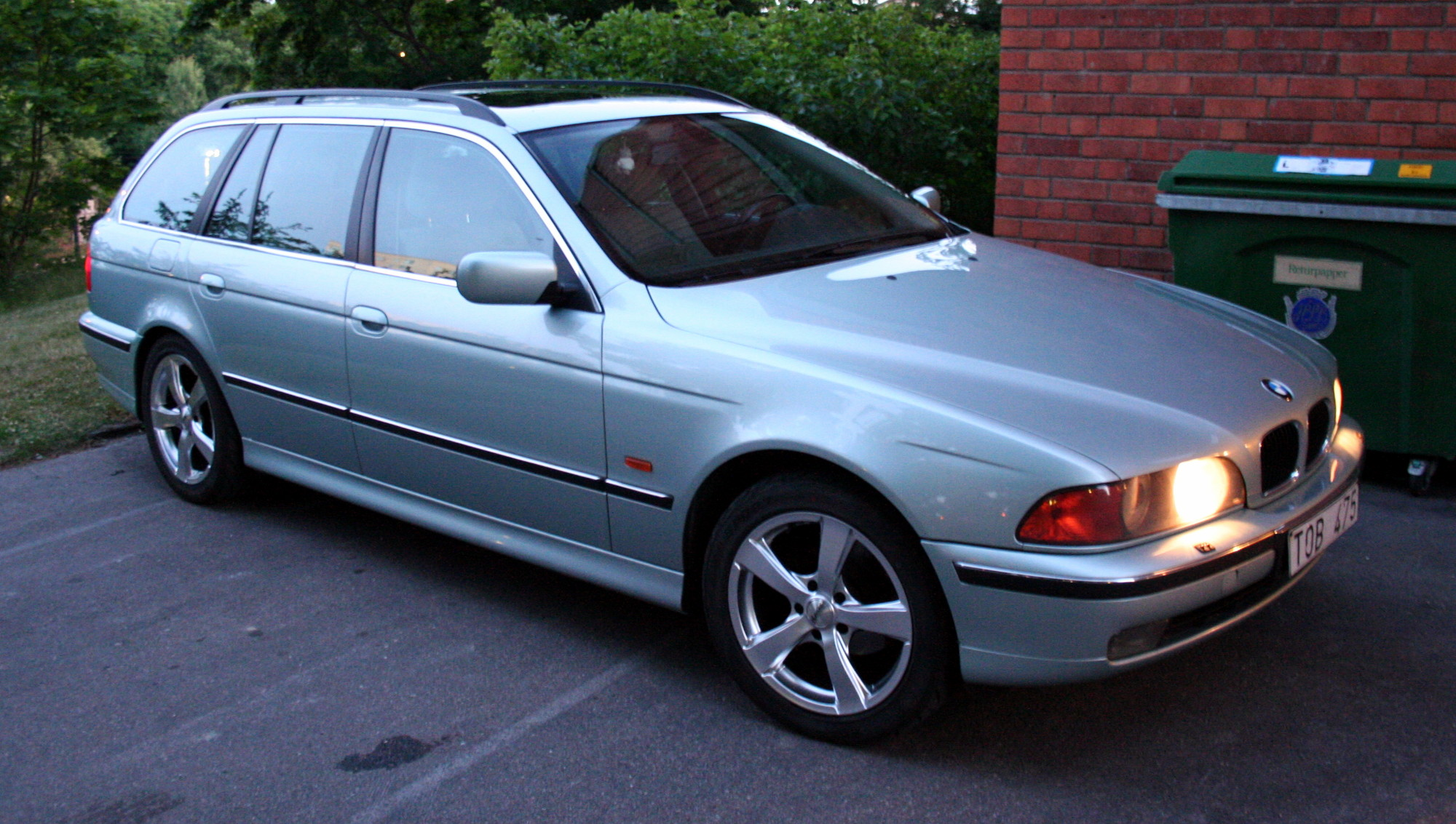 Foto:Jimmy Engelbrecht